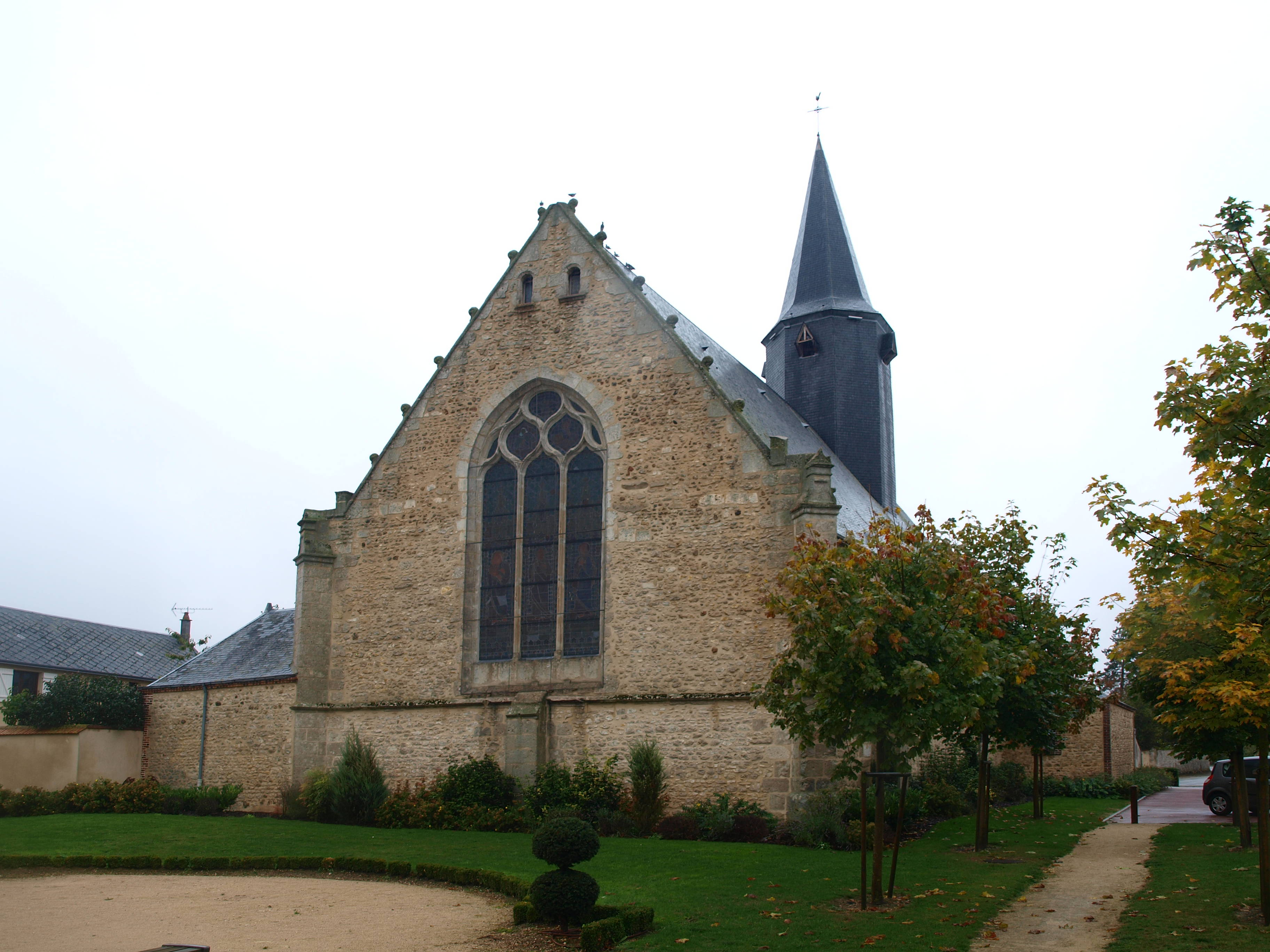 Villiers-Saint-Orien (Eure-et-Loir, France) : église.